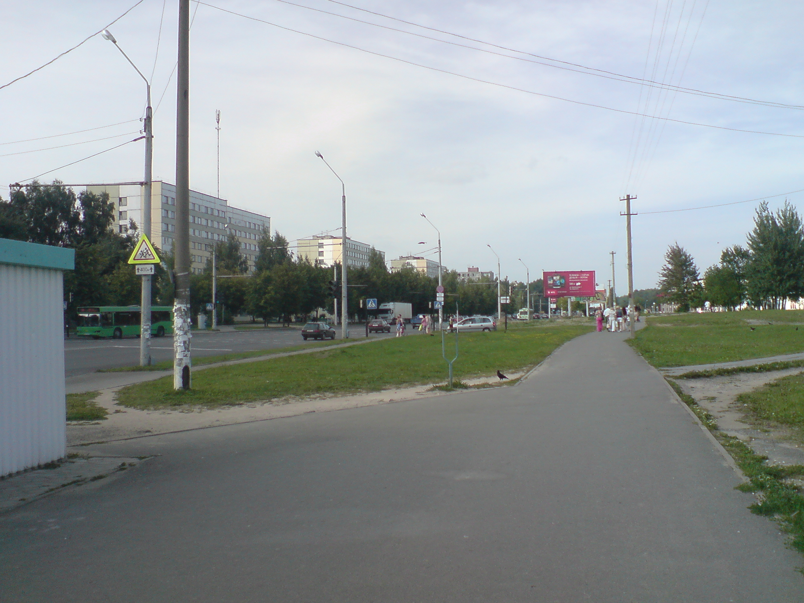 Соломинка, Могилёв, Belarus